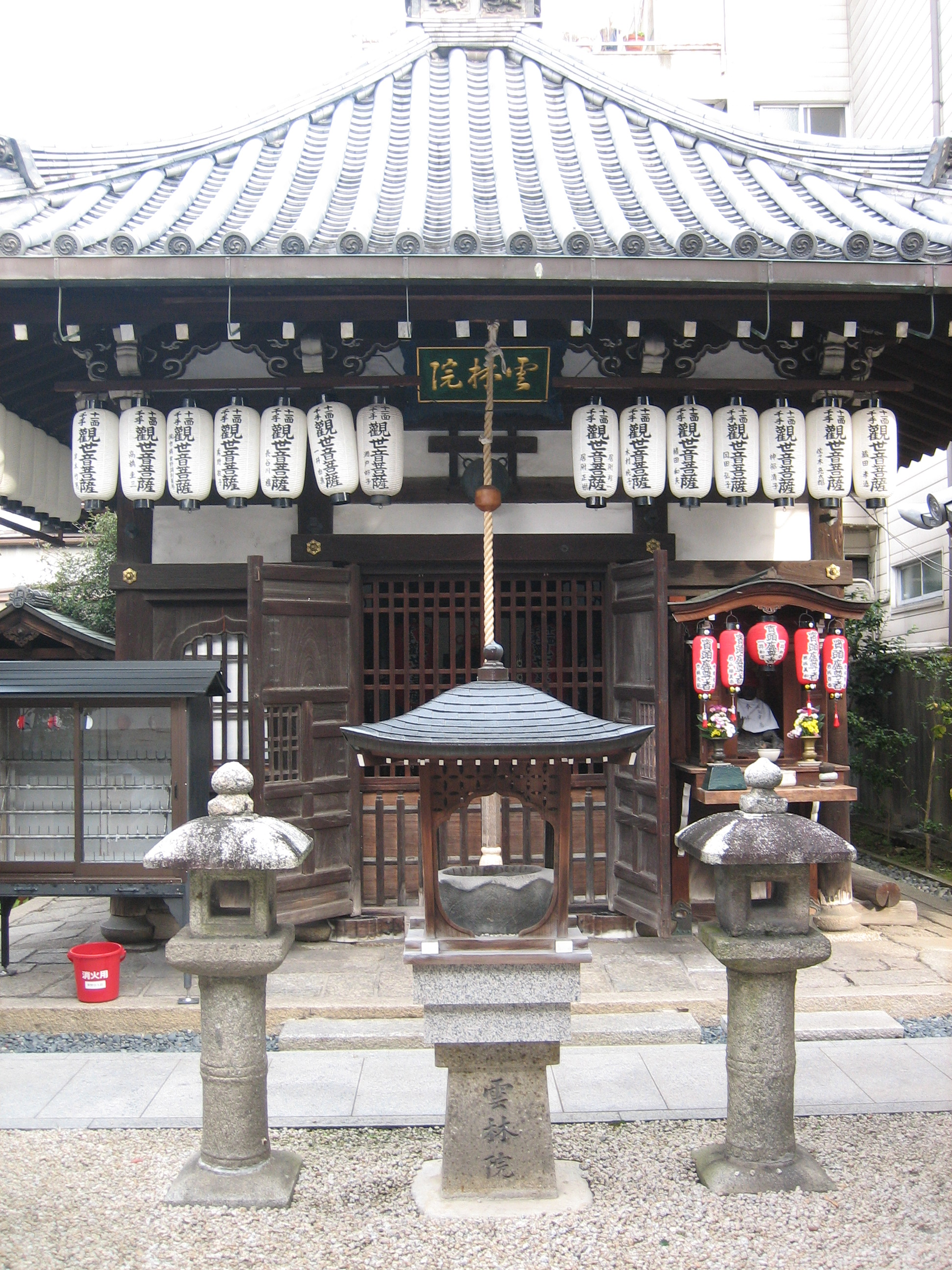 雲林院境内を京都市北区紫野雲林院町で撮影